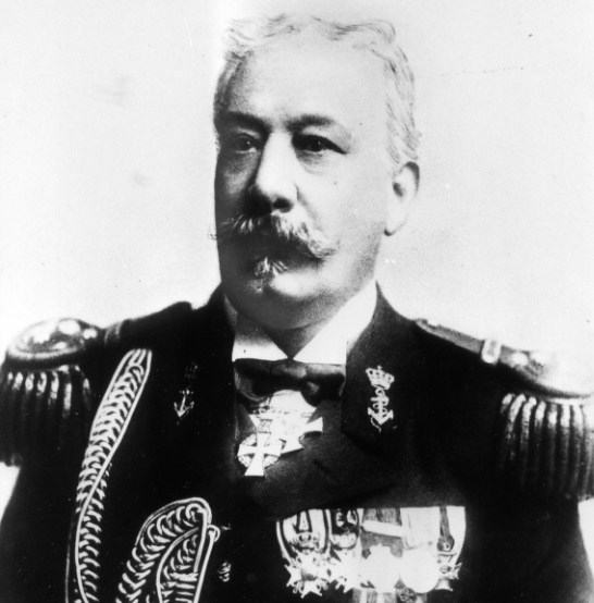 VADM A.G. Ellis (1846-1916), minister van Marine (1903-1905) en medeoprichter en eerste voorzitter van de Kon. Ned. Vereniging Onze Vloot in 1906